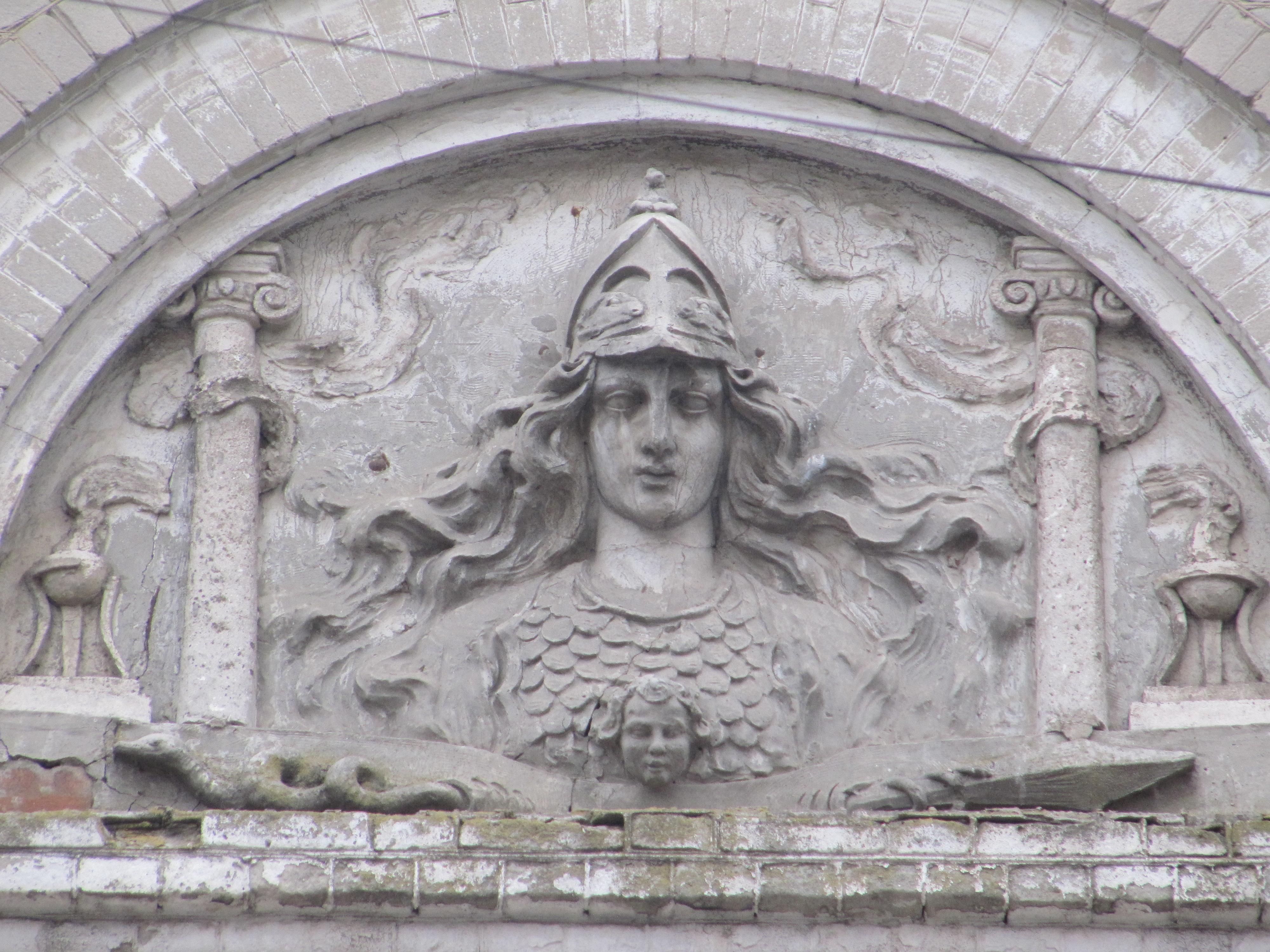 Афина барельеф на фронтоне, угол ул. Горького и ул. Сакко и Ванцетти. Саратов. Бывшее здание школы №3.